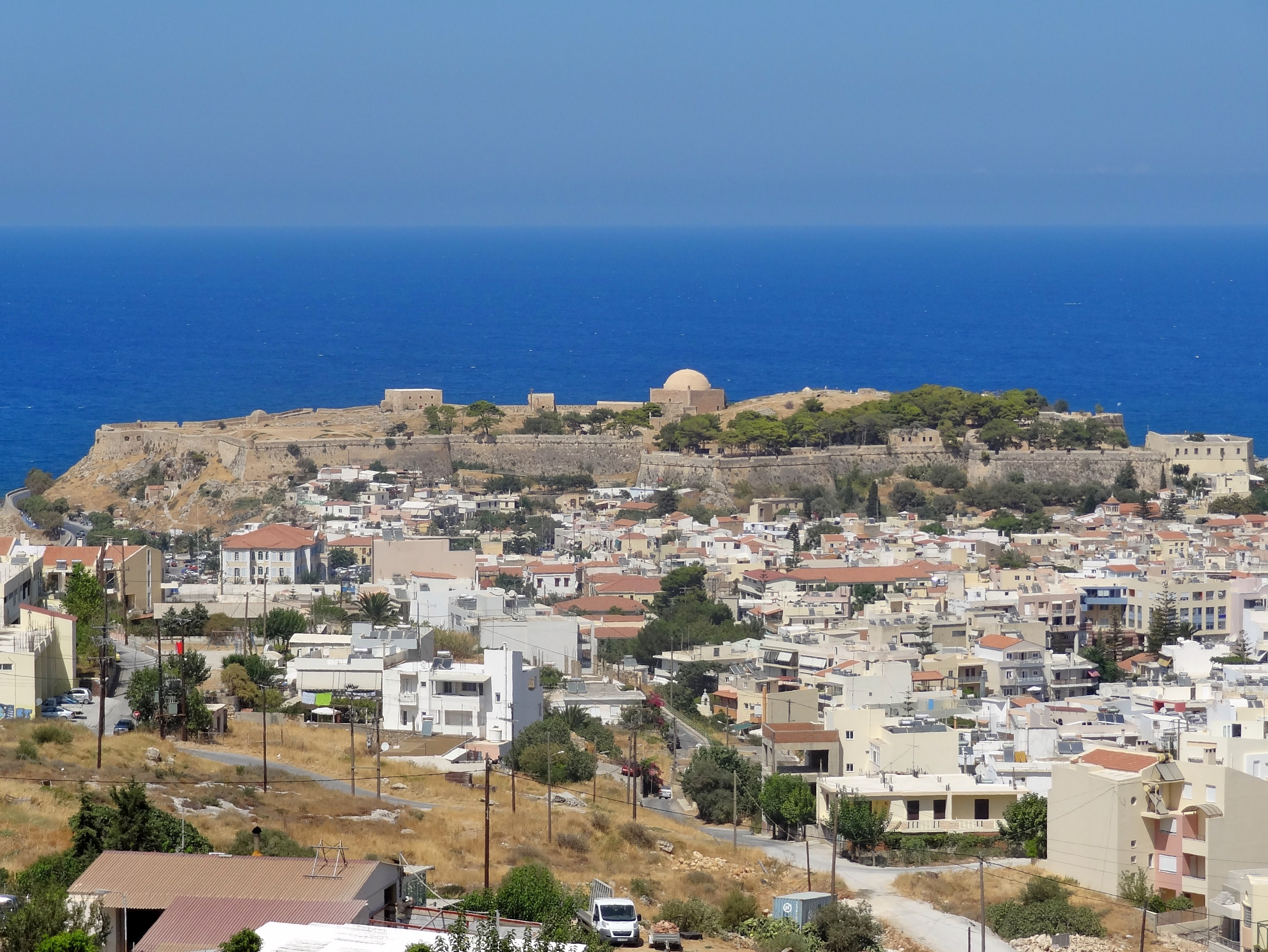 Fortezza von Rethymno (Φορτέτζα του Ρεθύμνου), Regionalbezirk Rethymno, Kreta, Griechenland